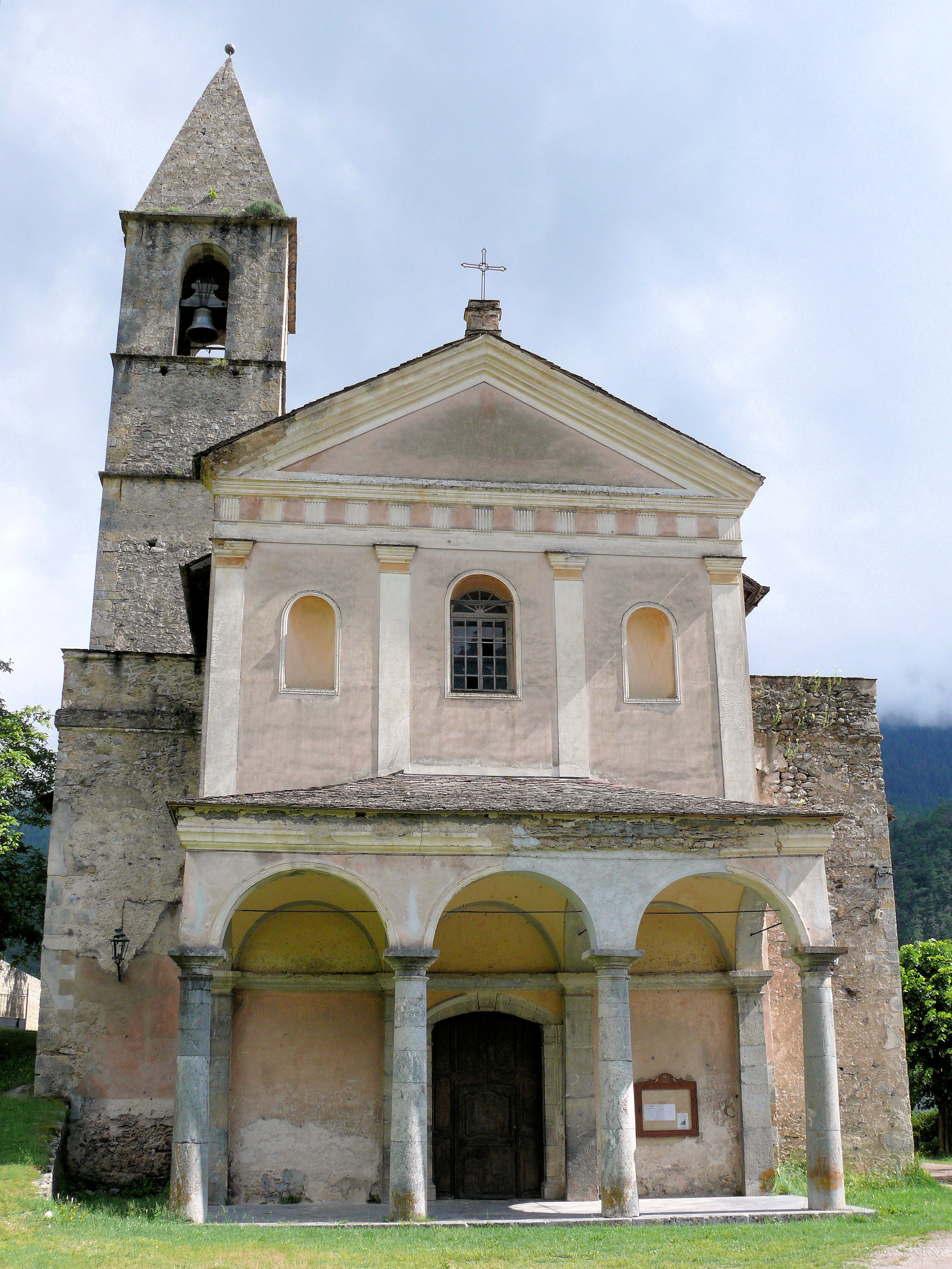 Valdeblore - La Bolline - Eglise Saint-Jacques-le-Mineur